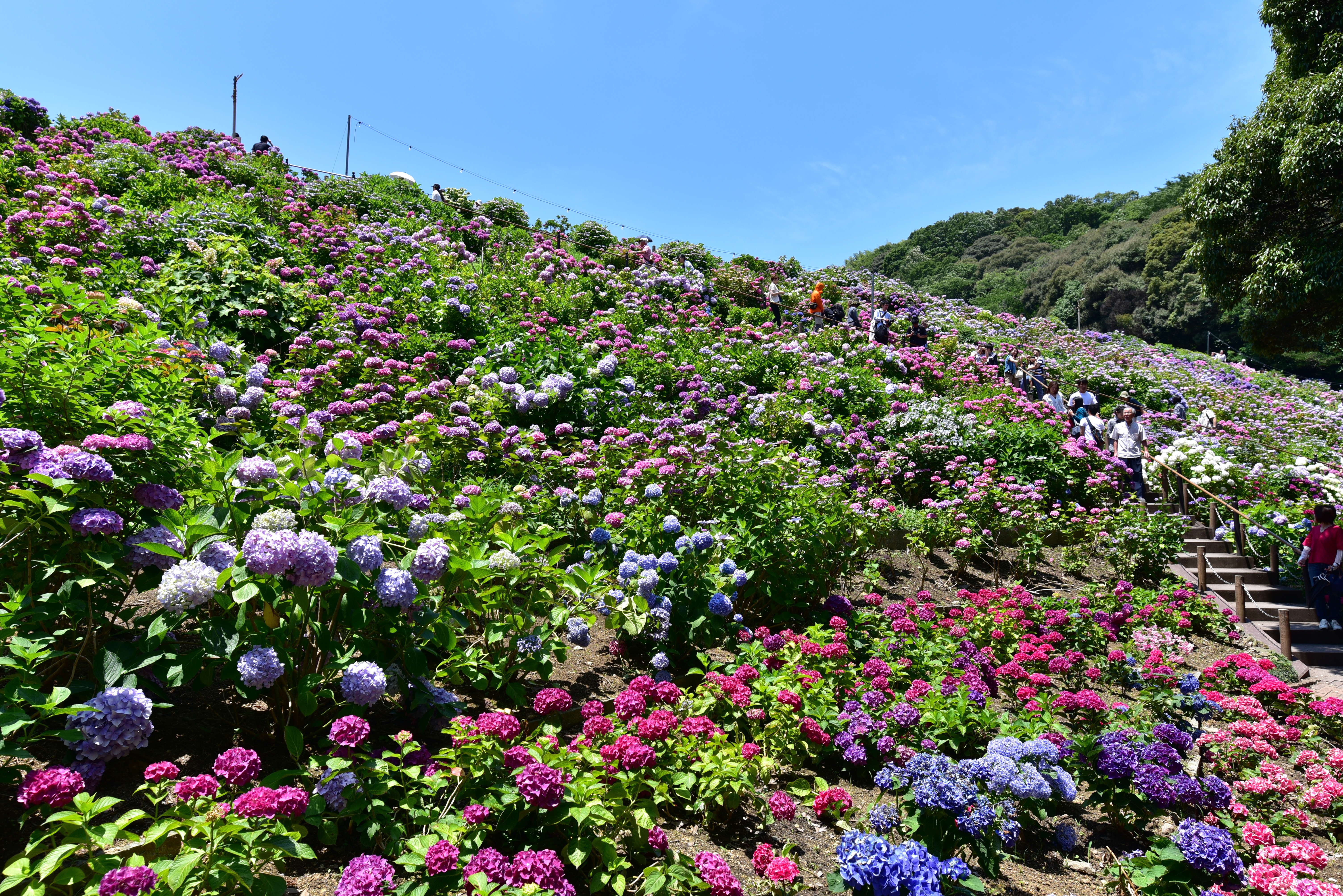 形原温泉あじさいの里 Nikon D750